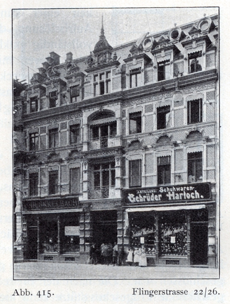 Doppelhaus Flinger Straße Nr. 22/26 in Düsseldorf, erbaut von 1890 bis 1891 von Bernhard Tüshaus & von Leo von Abbema für die Firma Christian Unkelbach.jpg